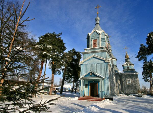 Миколаївська церква в Синяві: Пам'ятка дерев'яного зодчества національного значення